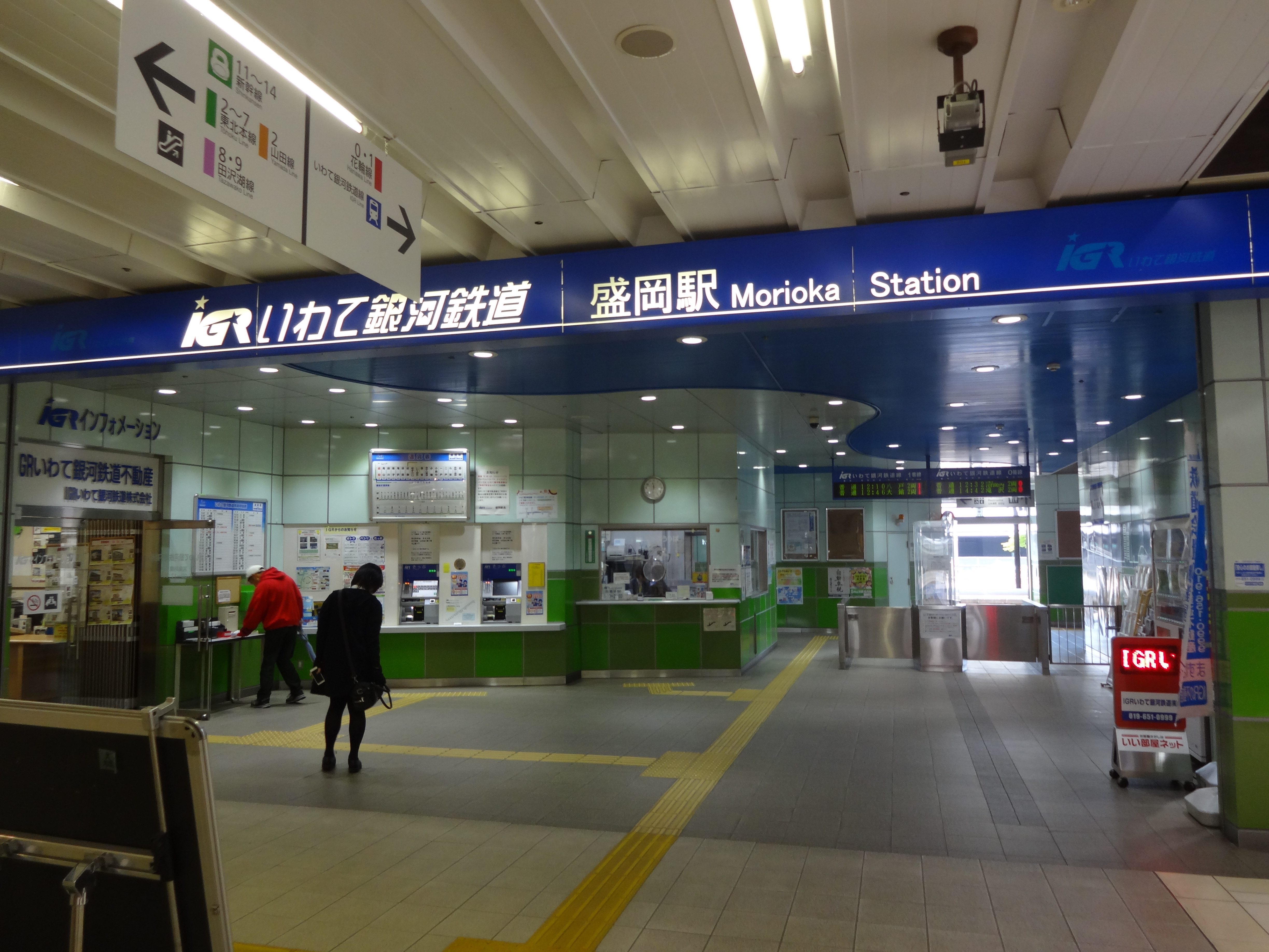 IGR盛岡駅改札口